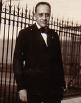 Vito Fazio Allmayer, filosofo,pedagogista ed insegnante